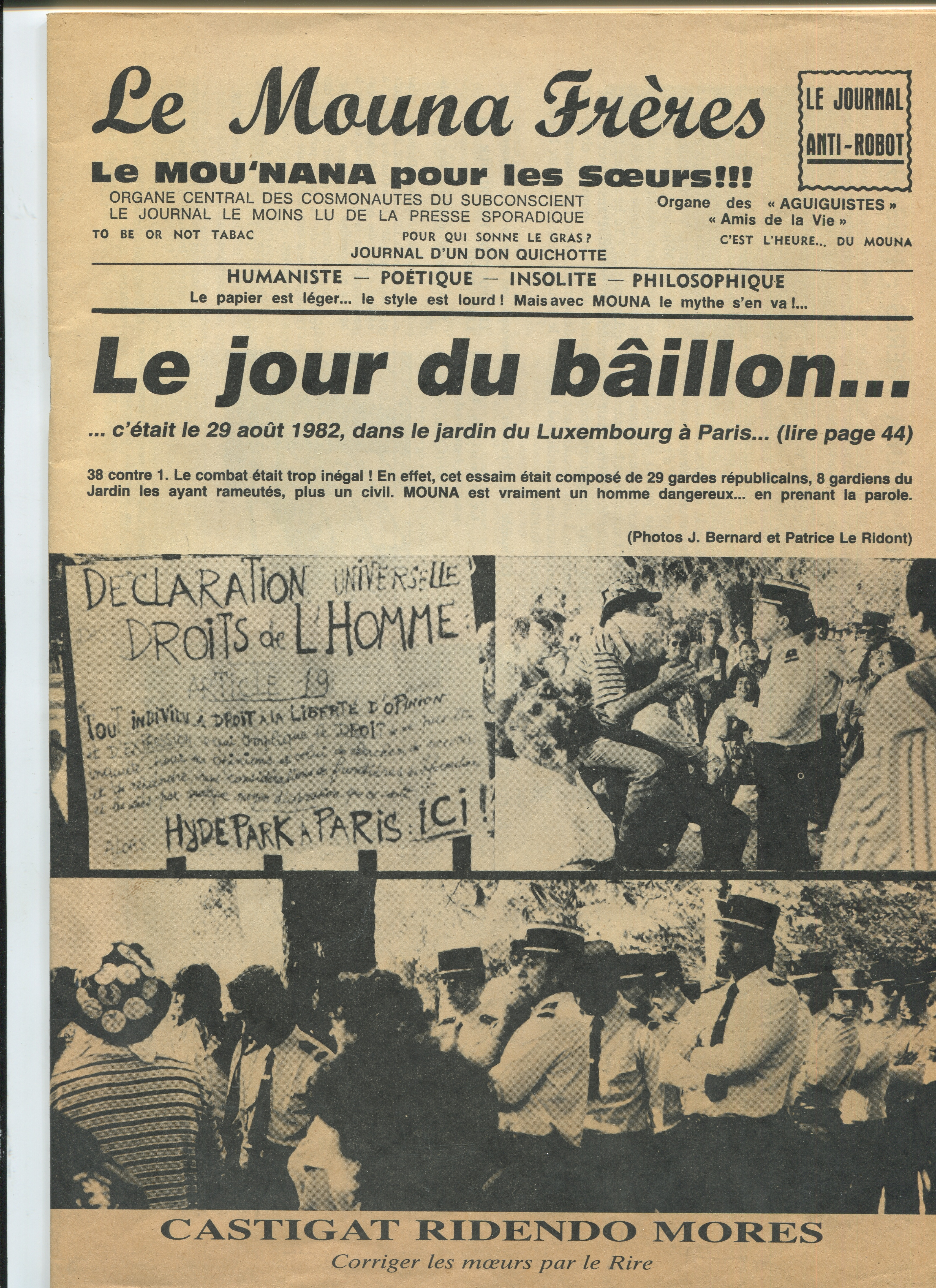 Le Mouna Frères. Revue éditée par Aguigui Mouna dans les années 80. " Organe central des cosmonautes du subconscient. Le journal le moins lu de la presse sporadique "